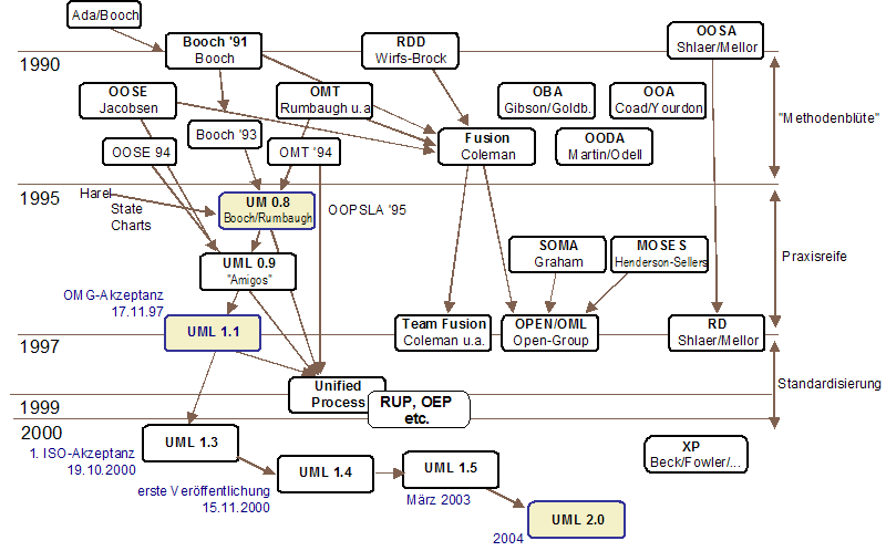 Historie der objektorientieren Methoden und Notationen